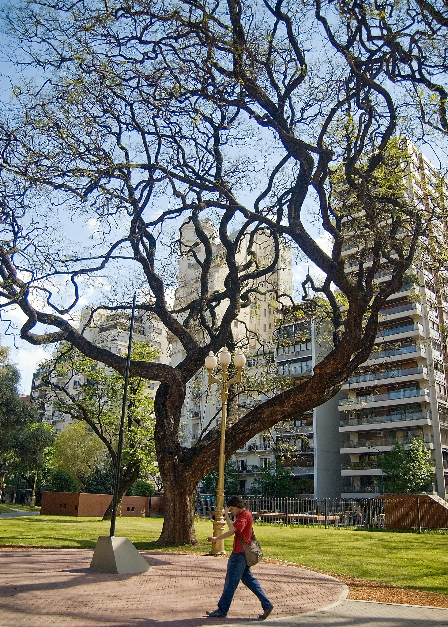 Plaza Vicente López, Buenos Aires.